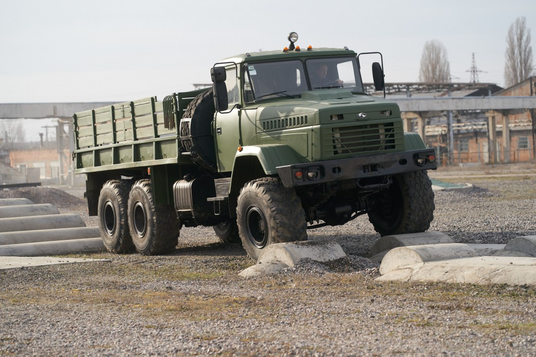 КРАЗ 6322 на території випробувального полігону у Кременчузі